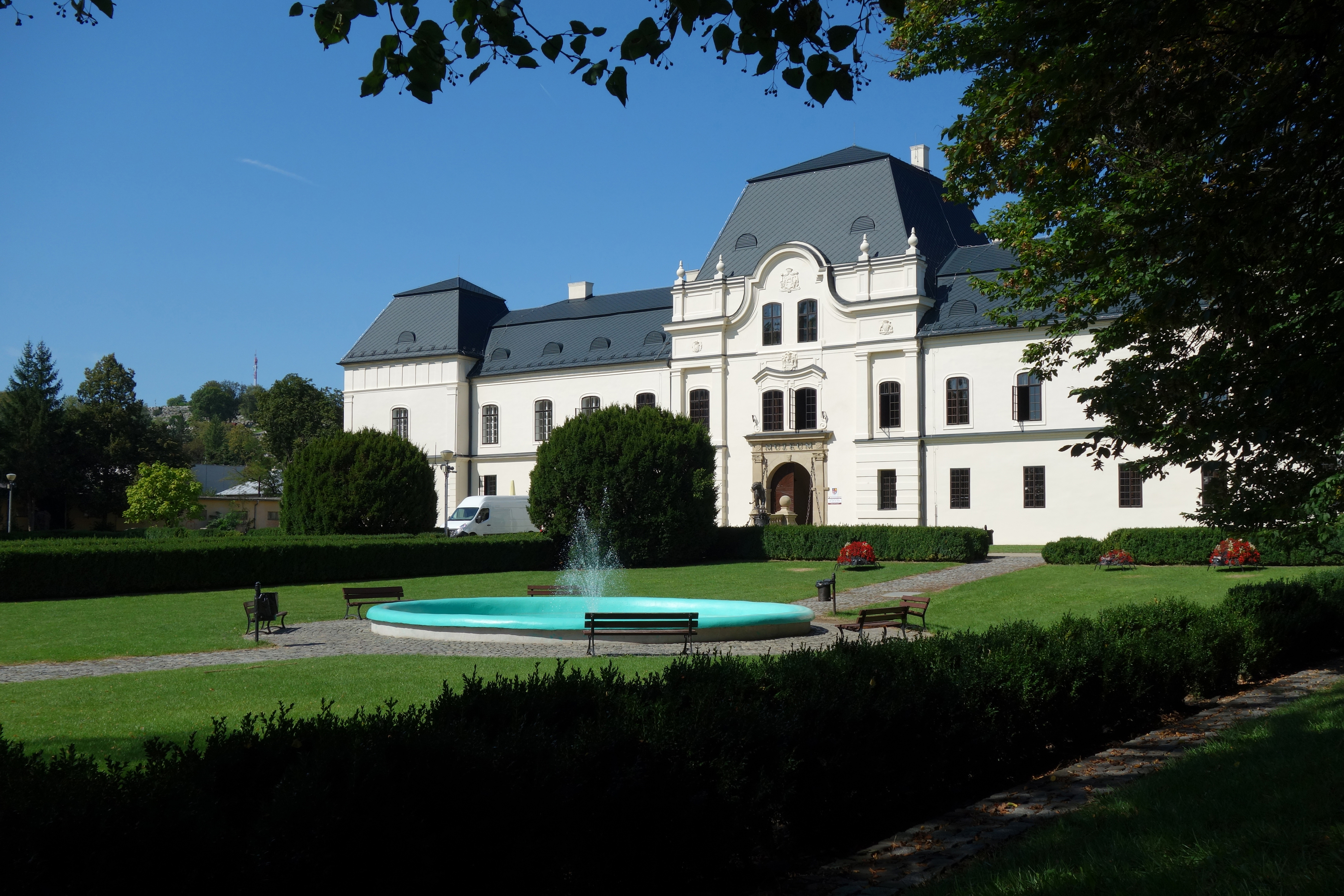 Humenský zámok (Kaštieľ v Humennom), v budove renesančného zámku sídli Vihorlatské múzeum